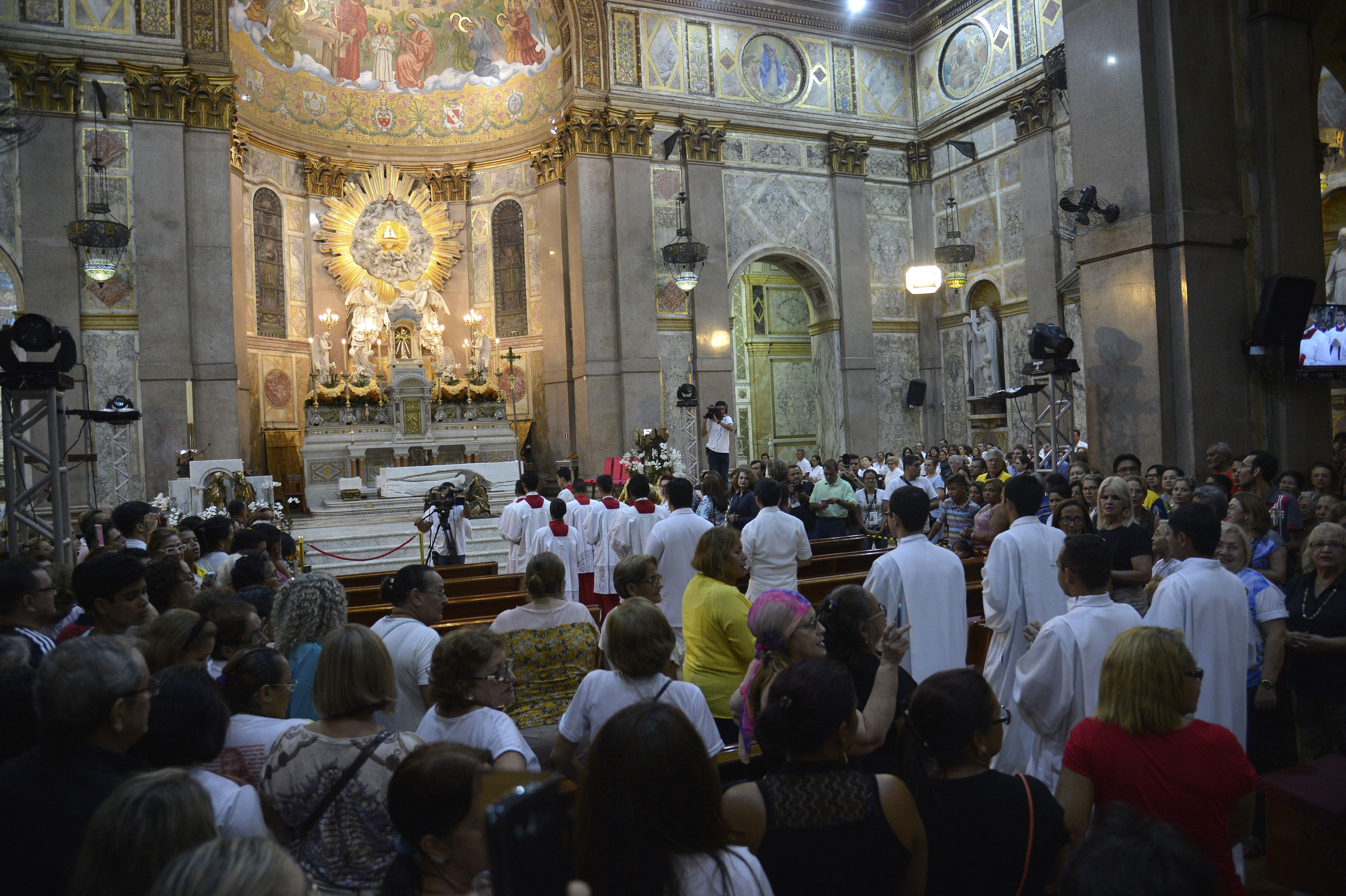 Missa e apresentação do manto de Nossa Senhora de Nazaré